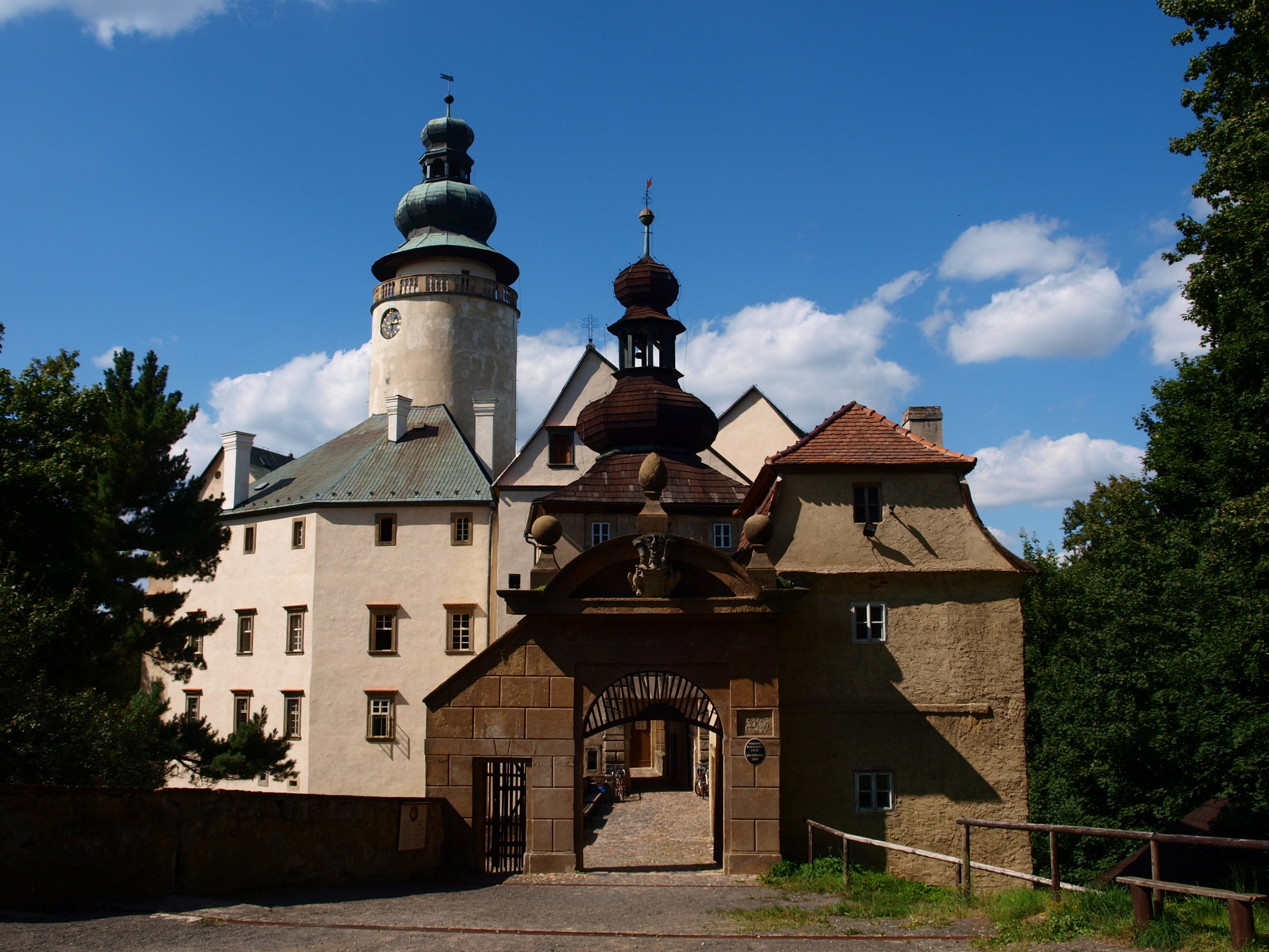 Zámek Lemberk